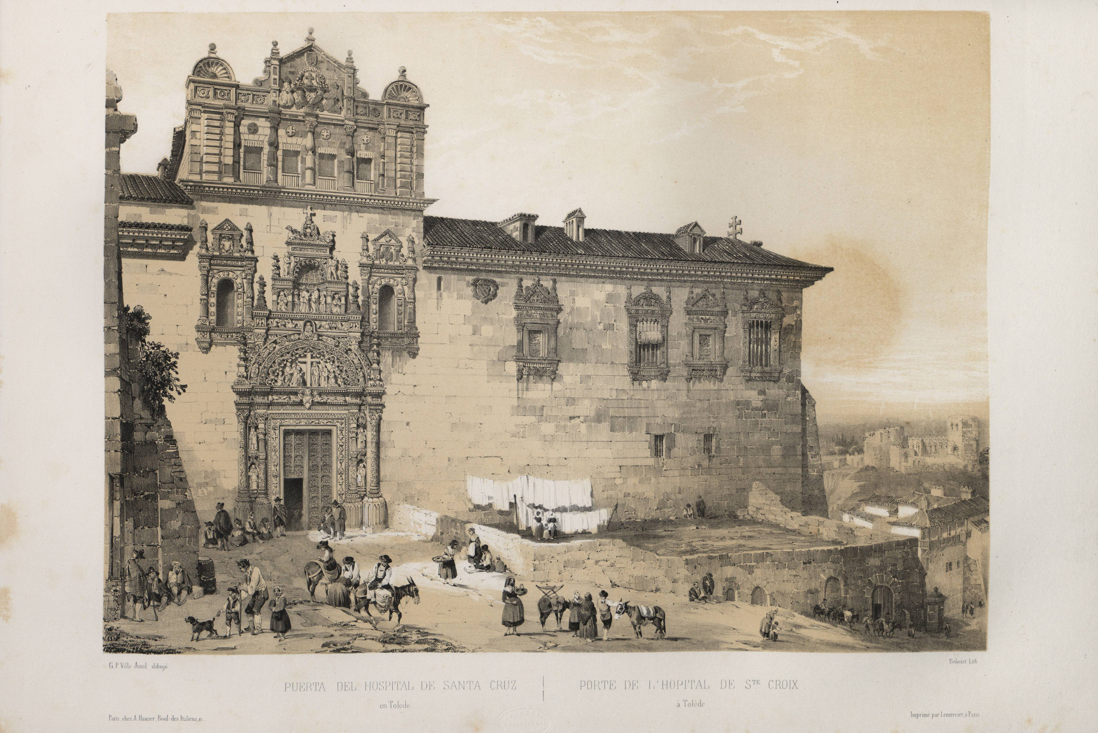 Puerta del Hospital de Santa Cruz en Toledo.